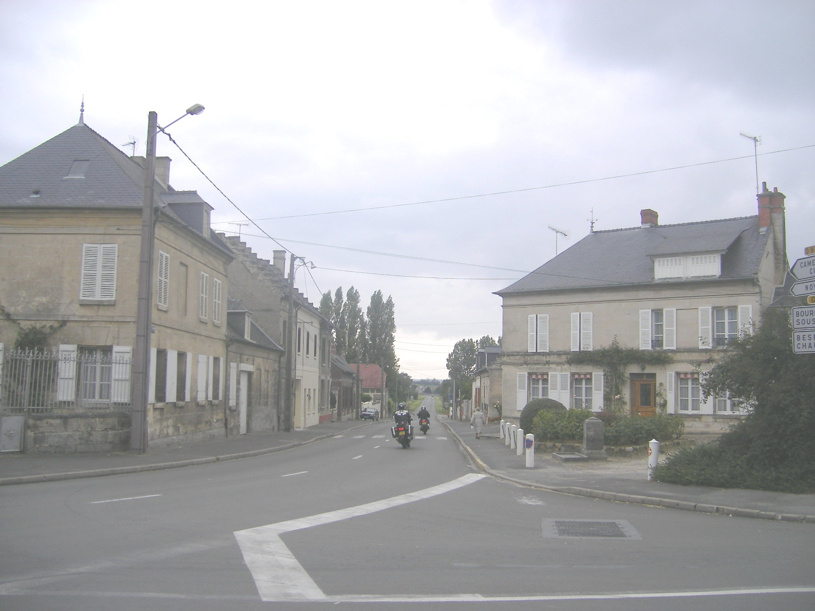 Blérancourt